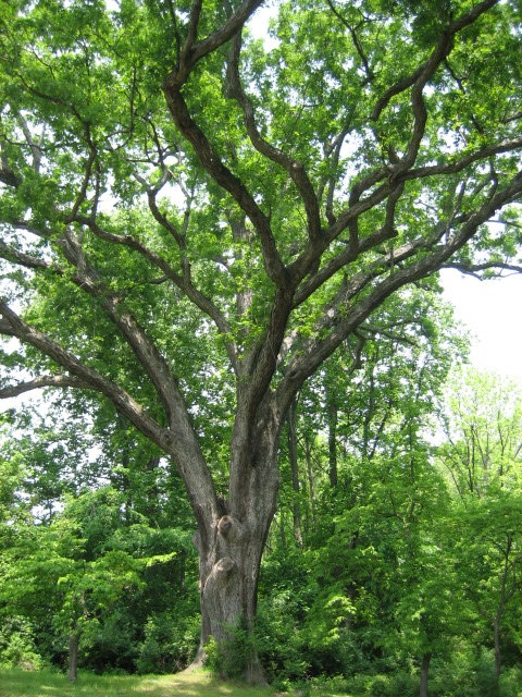 Linden Oak